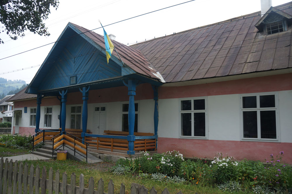 Будинок культури, с.Конятин